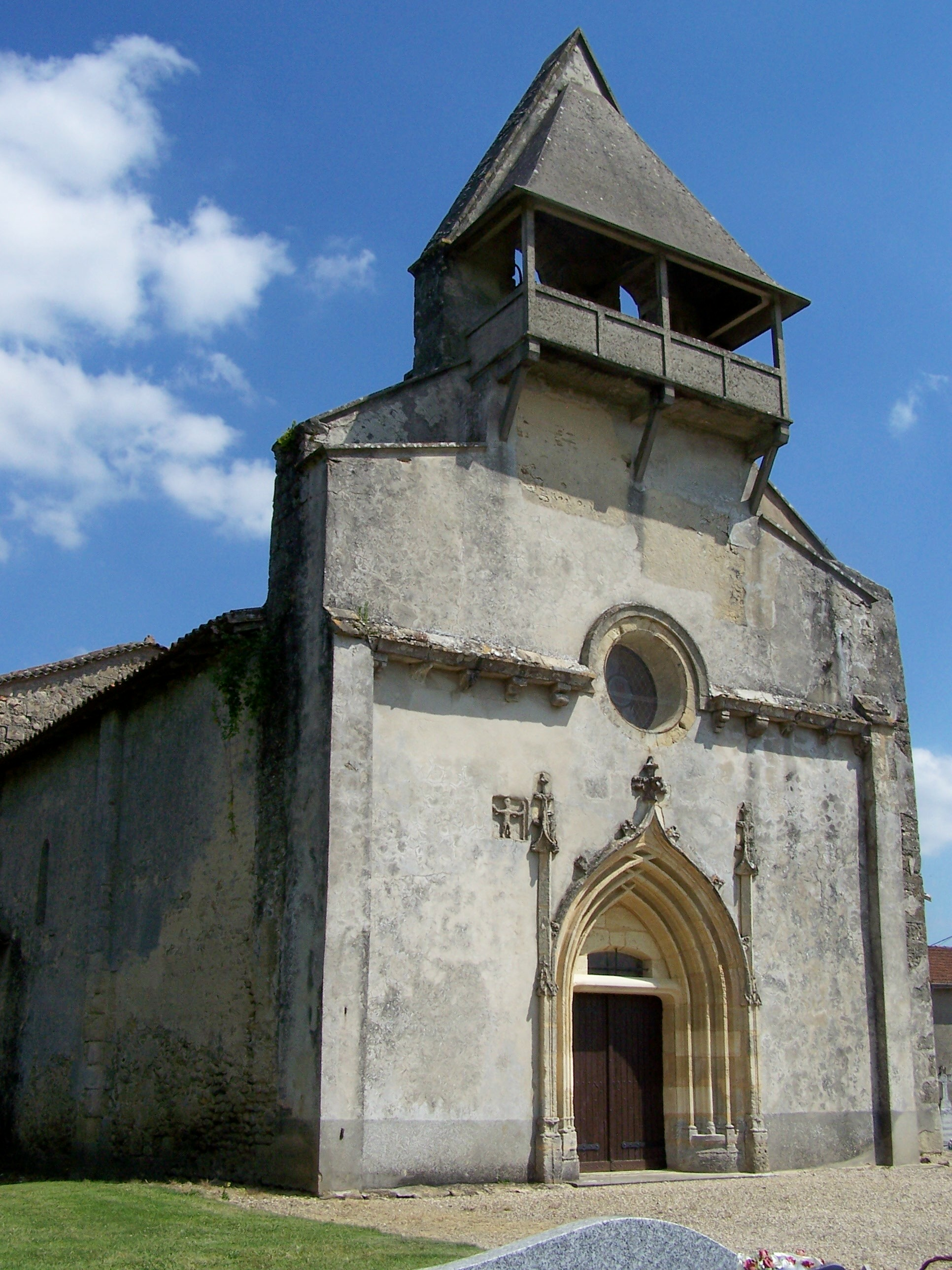 Vue nord-ouest de l'église Saint-Romain de Mazérac à Castets-en-Dorthe, Gironde, France